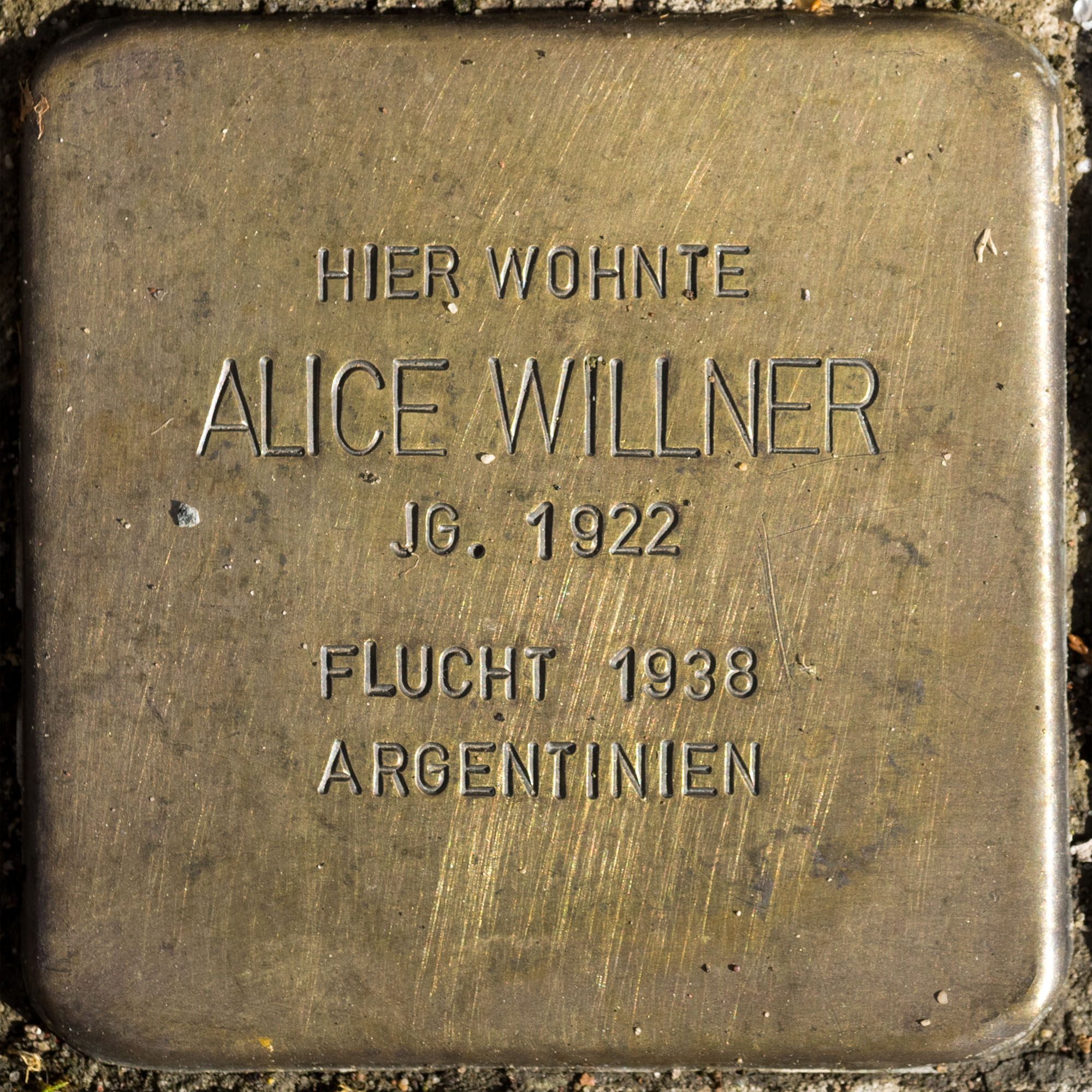 2016 Stolpersteine ToeVo Willner Alice